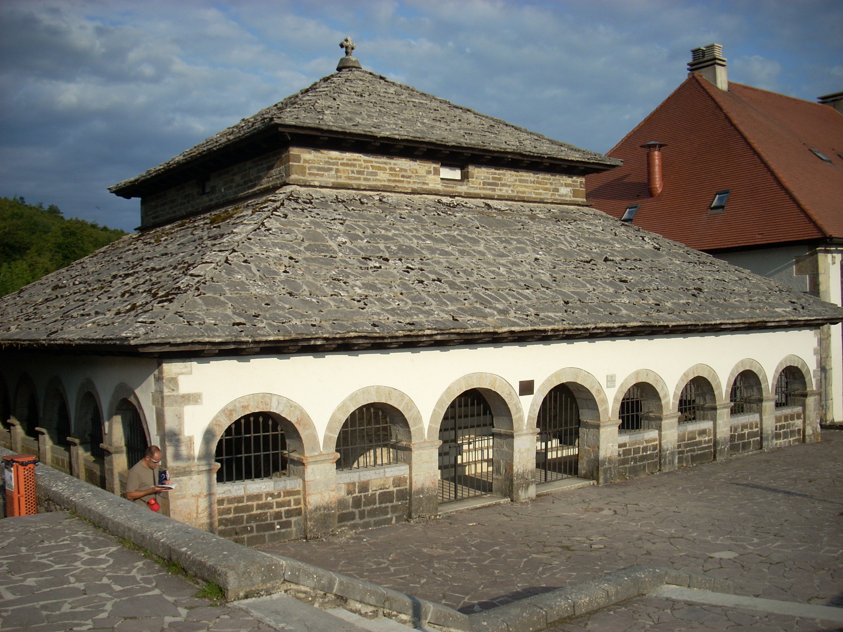 Cappella di Sancti Spiritus, Roncisvalle, Navarra, Spagna